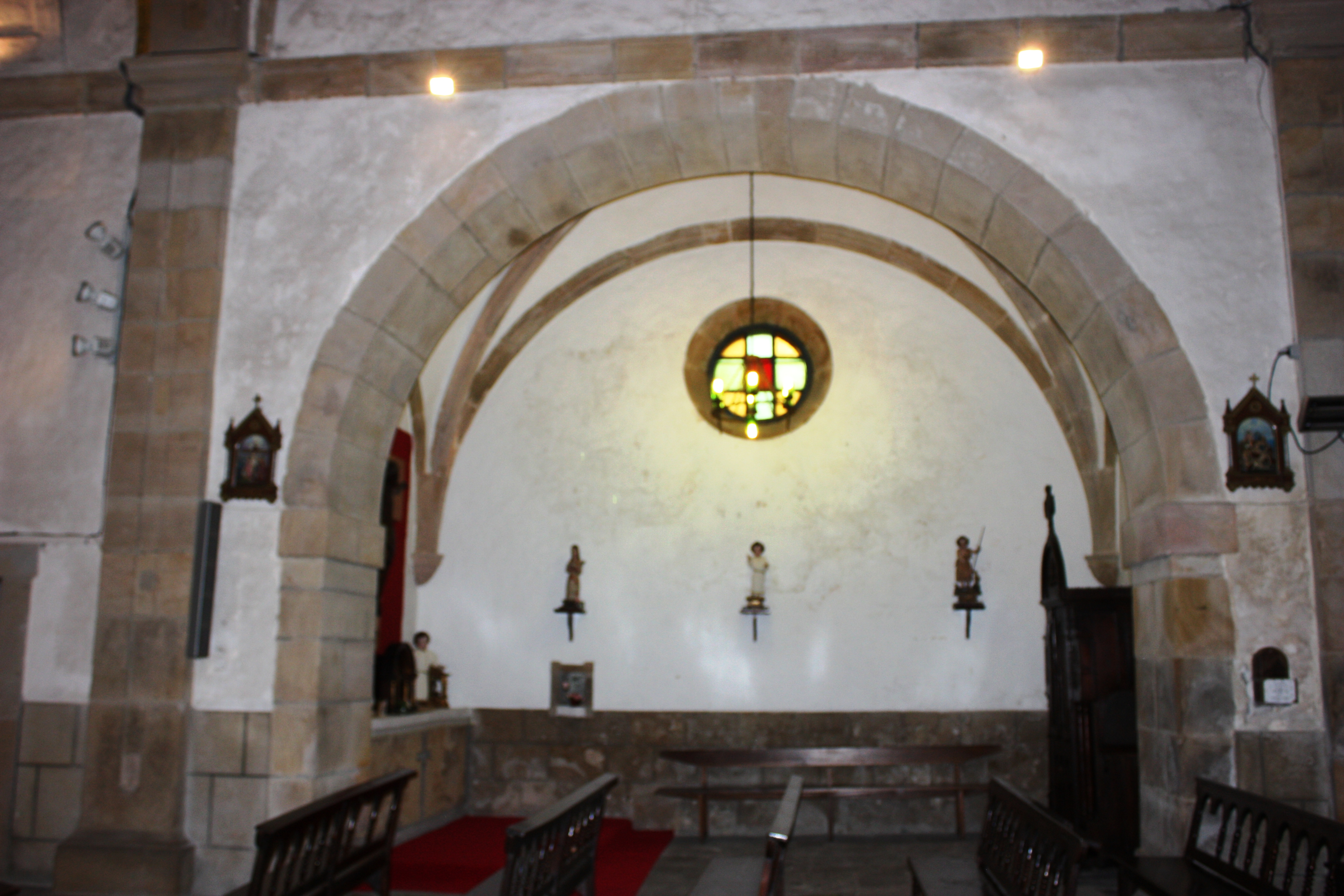 Santuario de Contrueces